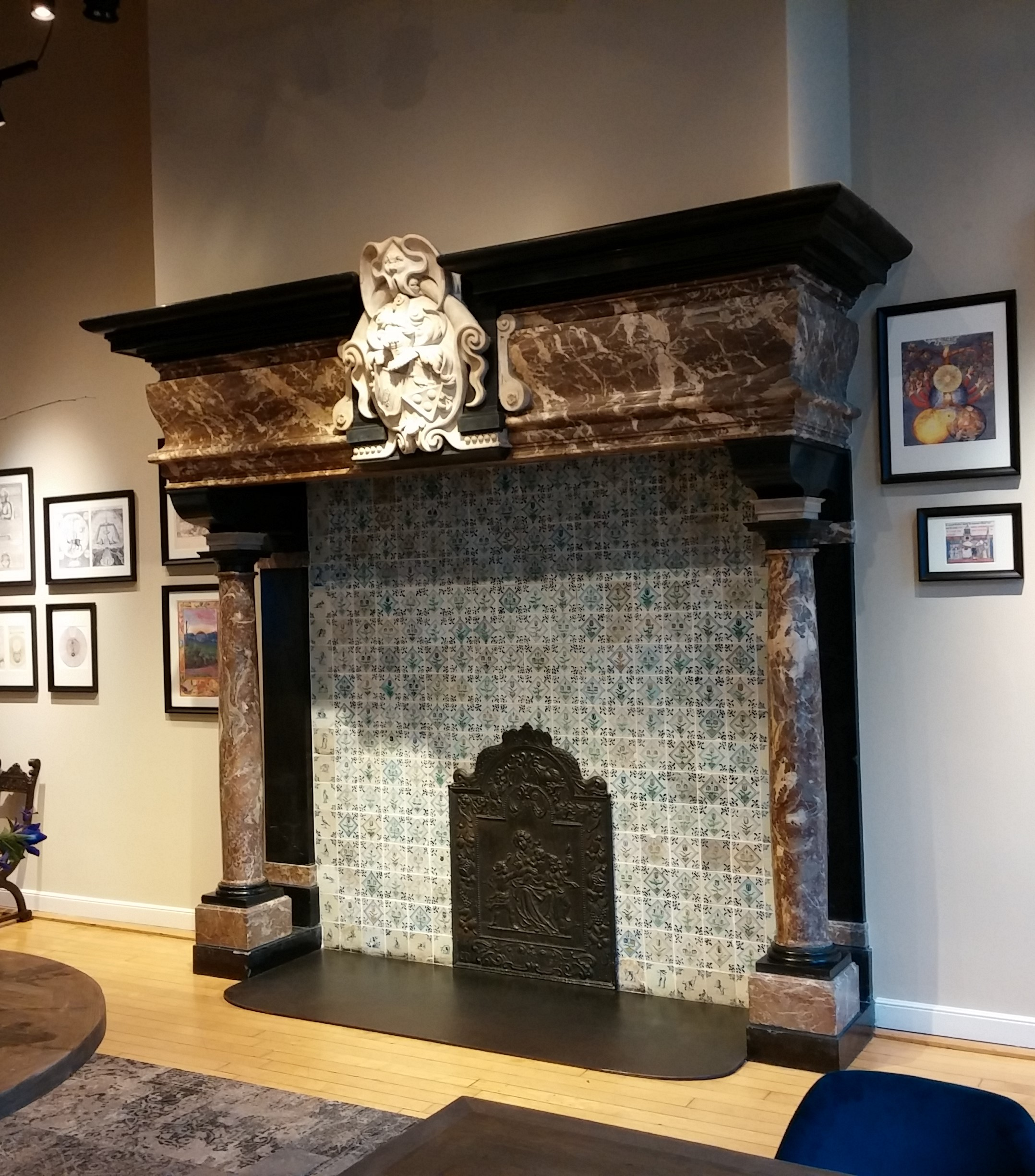 De grote schouw in de achterzaal van het Huis met de Hoofden, Keizersgracht 123, Amsterdam. De schouw draagt het wapen van de familie De Geer, en is meer dan 2 meter hoog. Foto gemaakt op 8 november 2017 (bijgesneden).